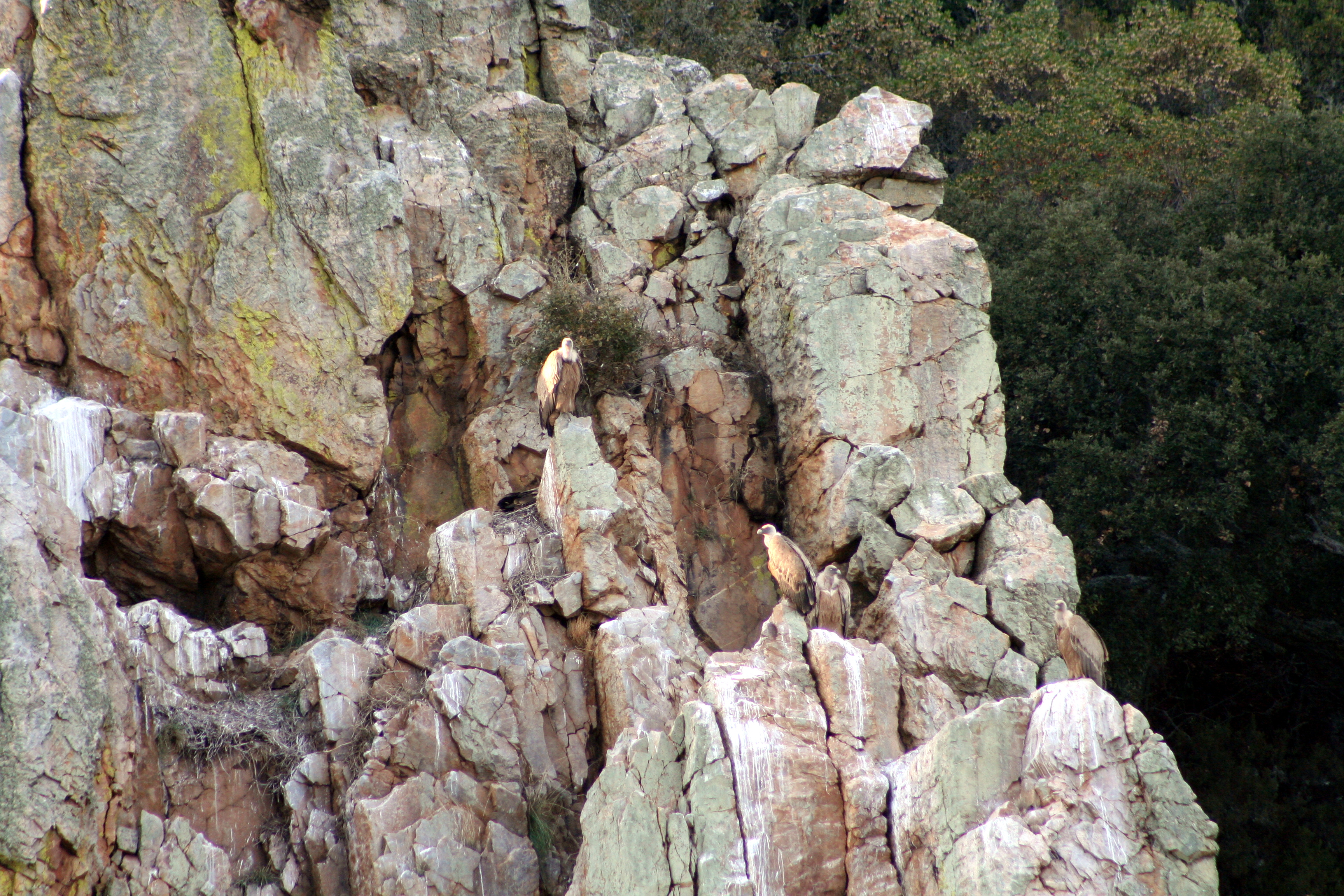 Parque Nacional de Monfragüe. En el roquedo se observan a 4 buitres leonados (Gyps fulvus)